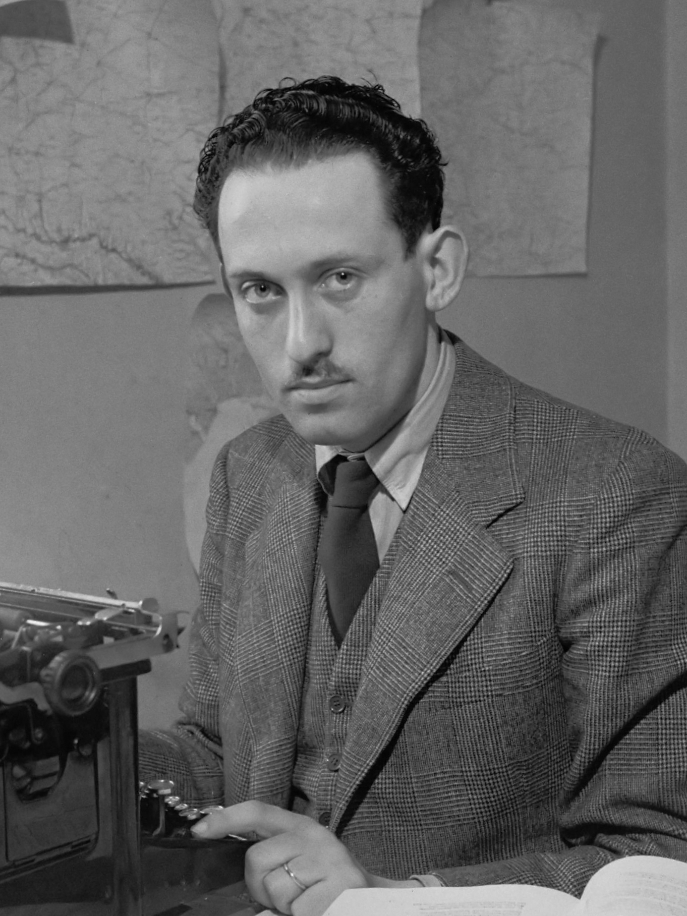 Loe de Jong (Medewerker Radio Oranje) maart 1942